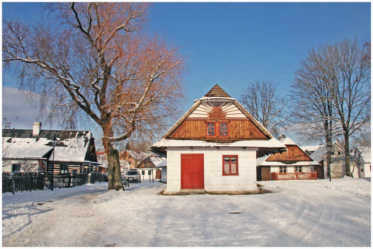 Hlinecký Betlém v zimě.